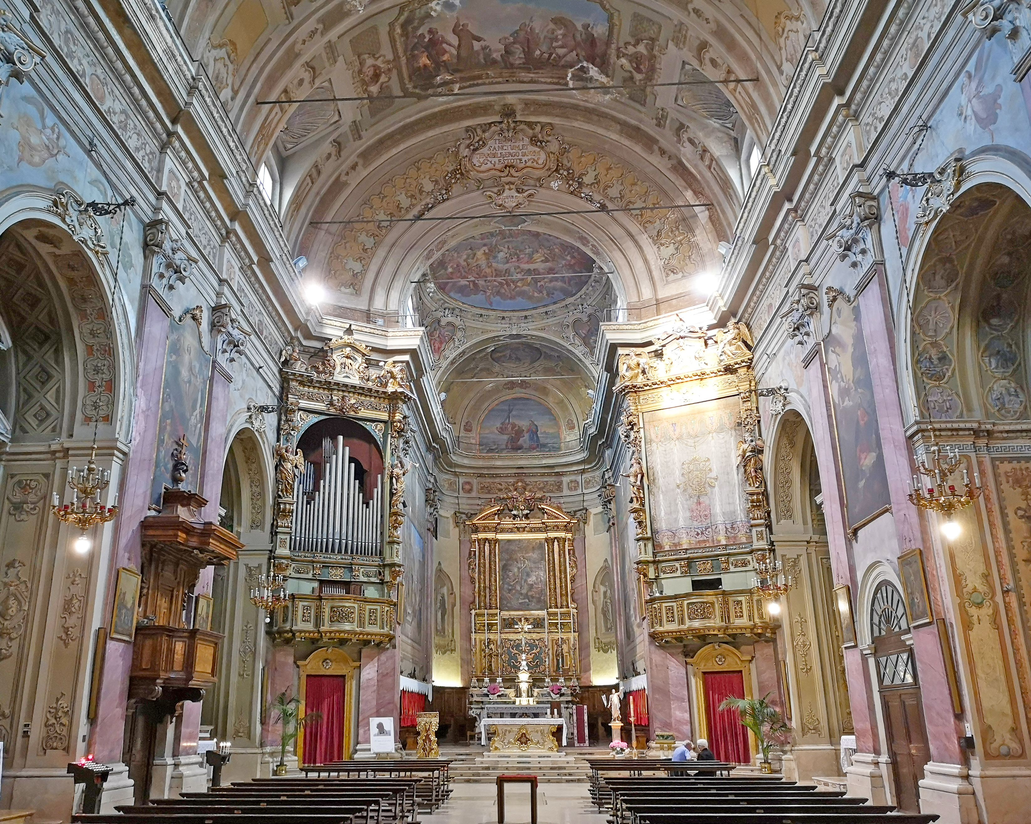 Interno della Chiesa dei Santi Pietro e Paolo, Travagliato